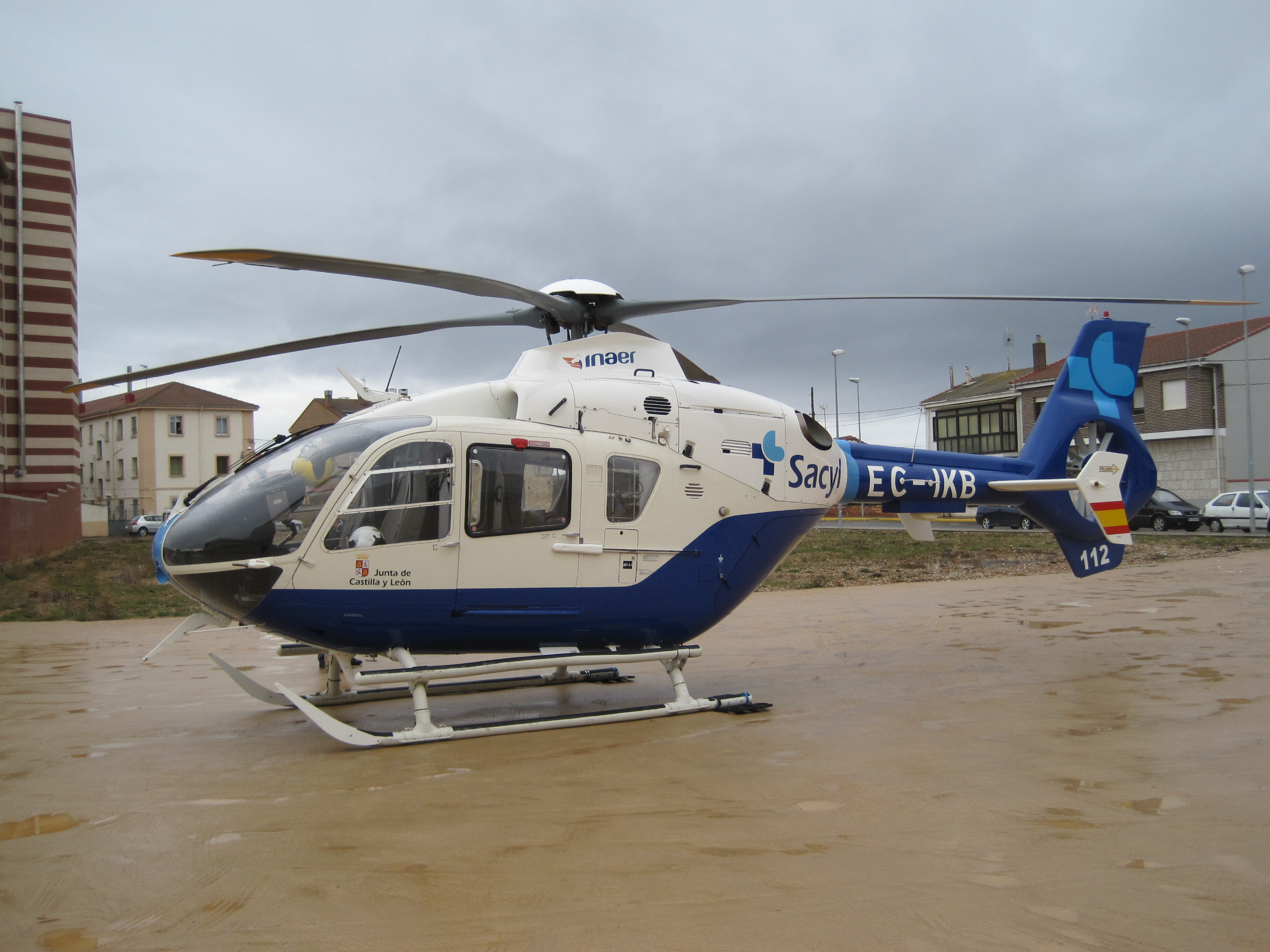 Helicóptero Eurocopter EC 135 T2 de Inaer, operando para Sanidad de Castilla y León (España) con sede en Astorga, León.